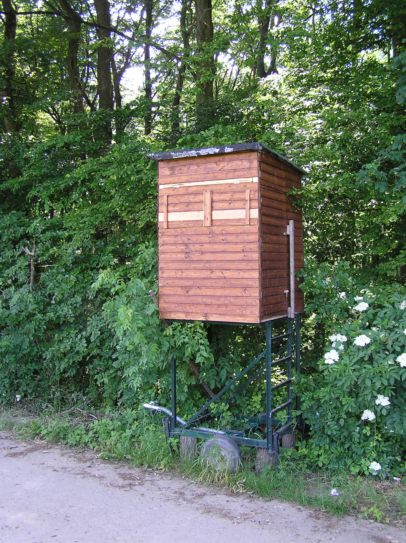 Fahrbarer Hochsitz, Aichelberg